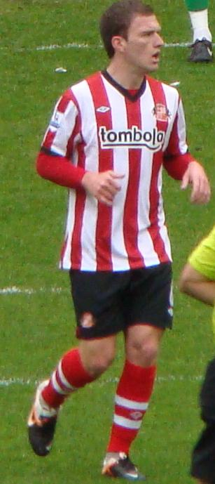 SAFC vs MUFC